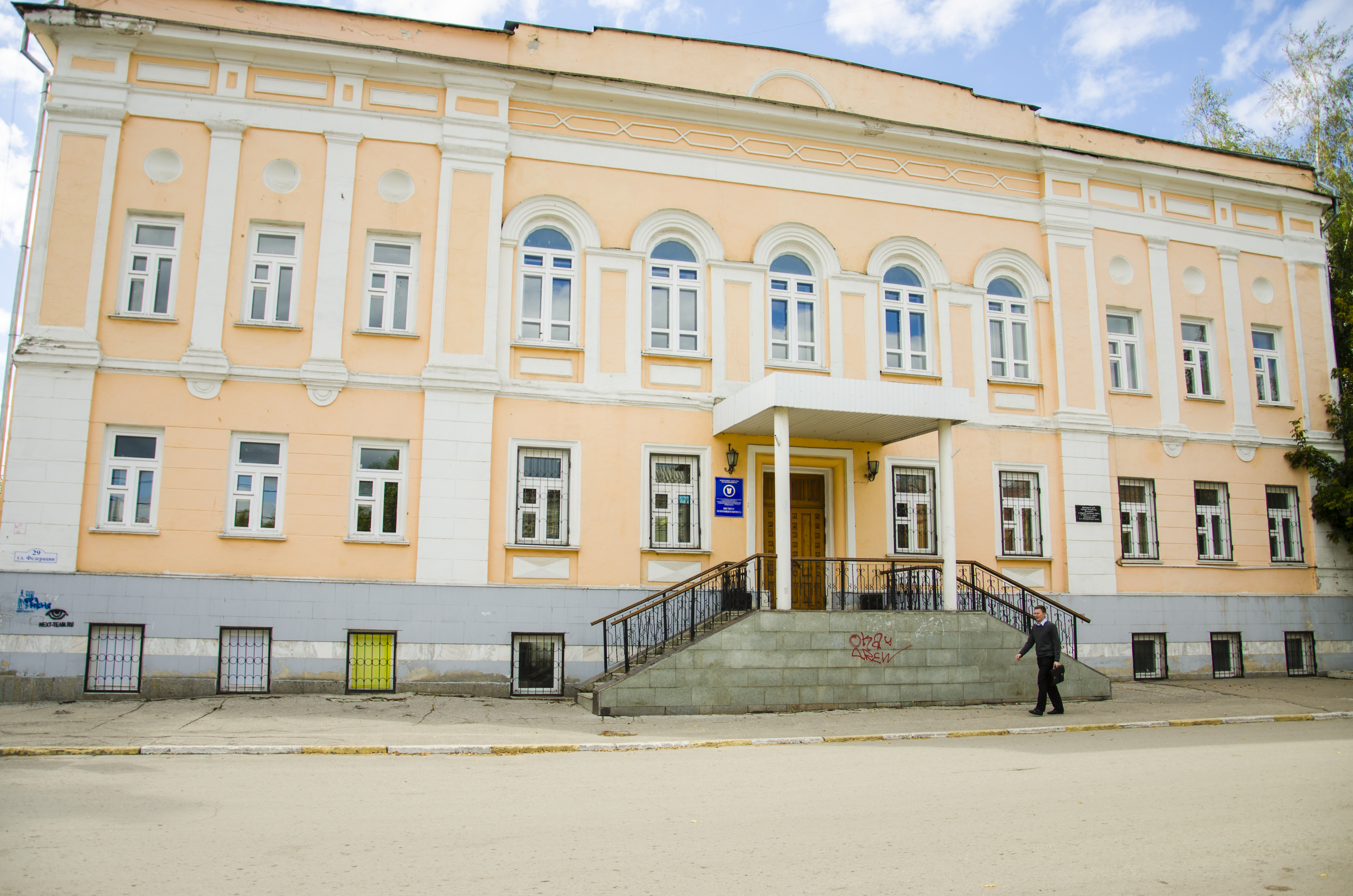 Институт экономики и бизнеса, УлГУ (ул. Федерации, д.29, г. Ульяновск). Бывшее здание здание 2-й полицейской части и гимназии. Является памятником архитектуры